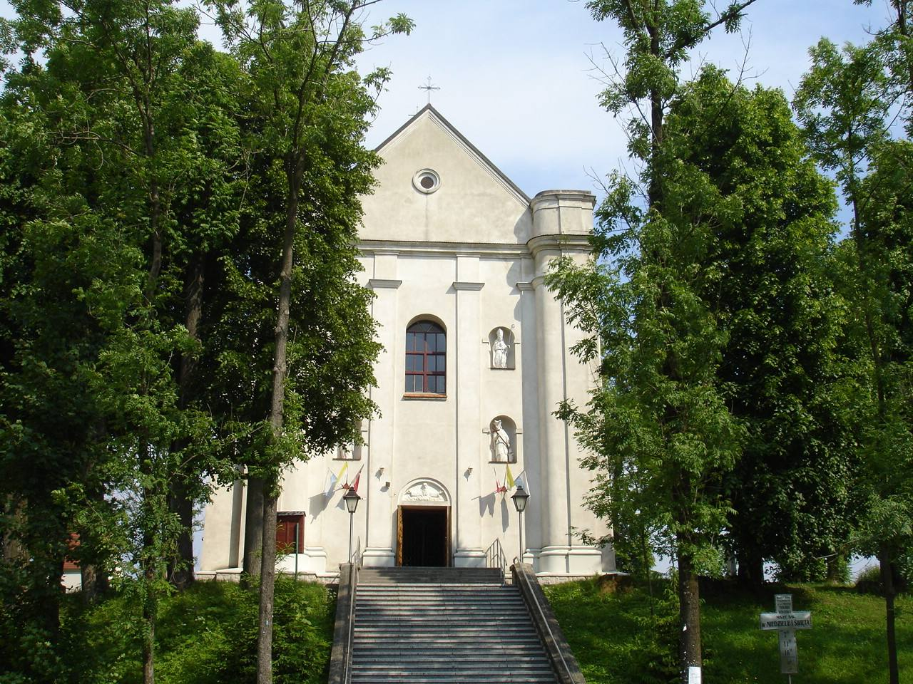 łaciński kościół w Tyrawie Wołoskiej